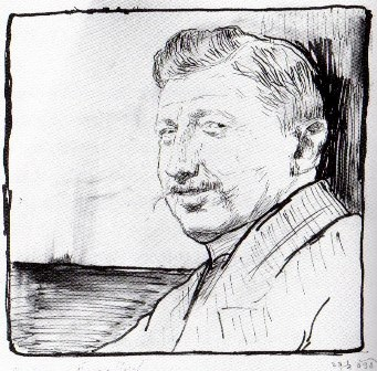 Josef Beyer: Selbstbildnis, Federzeichnung und Tusche (1898), Wien, Albertina